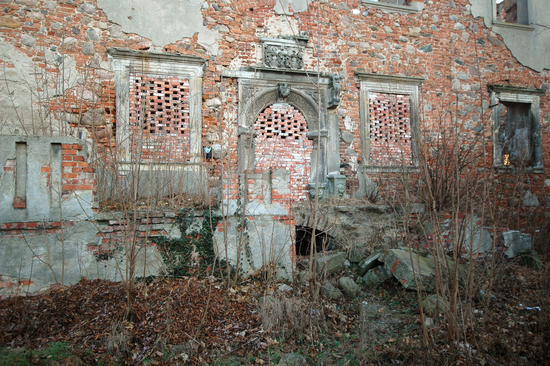 Pałac (ruina) i spichlerz Grębocice, Grębocice